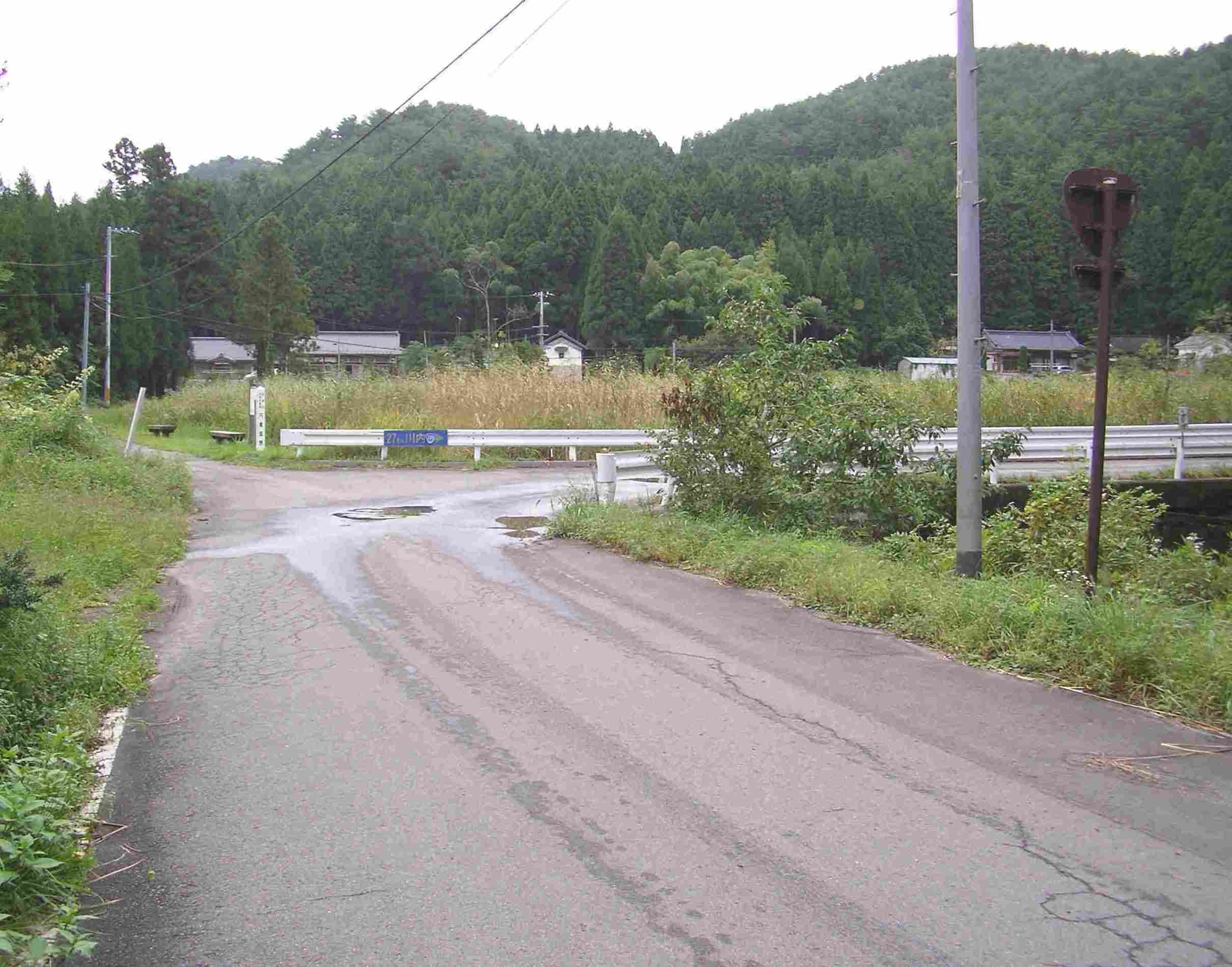 国道399号、いわき市上小川交差点を市内側から撮影。右折する国道は直進方向の市道と判別しがたい。前方の小規模な湿地は内倉湿原（いわき市指定天然記念物）。2007年9月